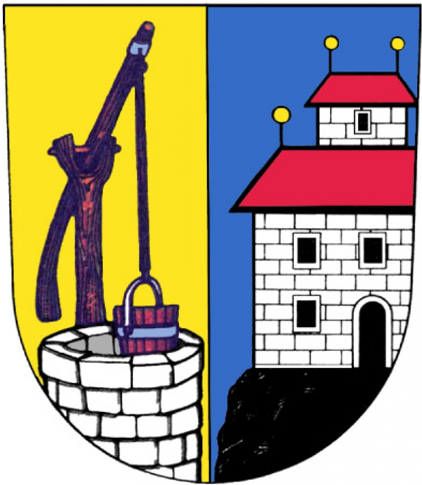 Znak města Holice u Pardubic